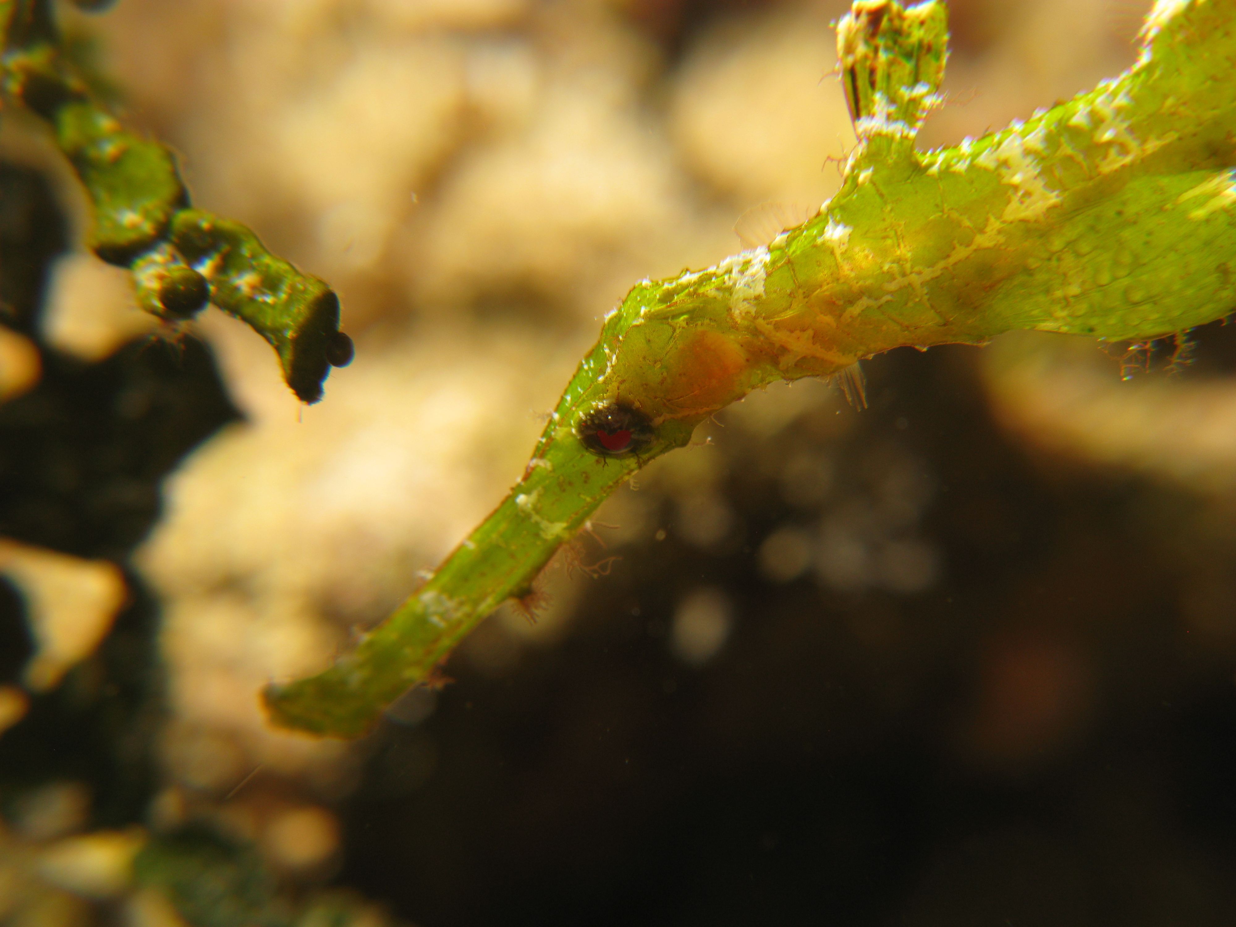 Halimeda Ghostpipefish - Solenostomus halimeda Halimeda Geisterpfeifenfisch, Sulawesi Sea